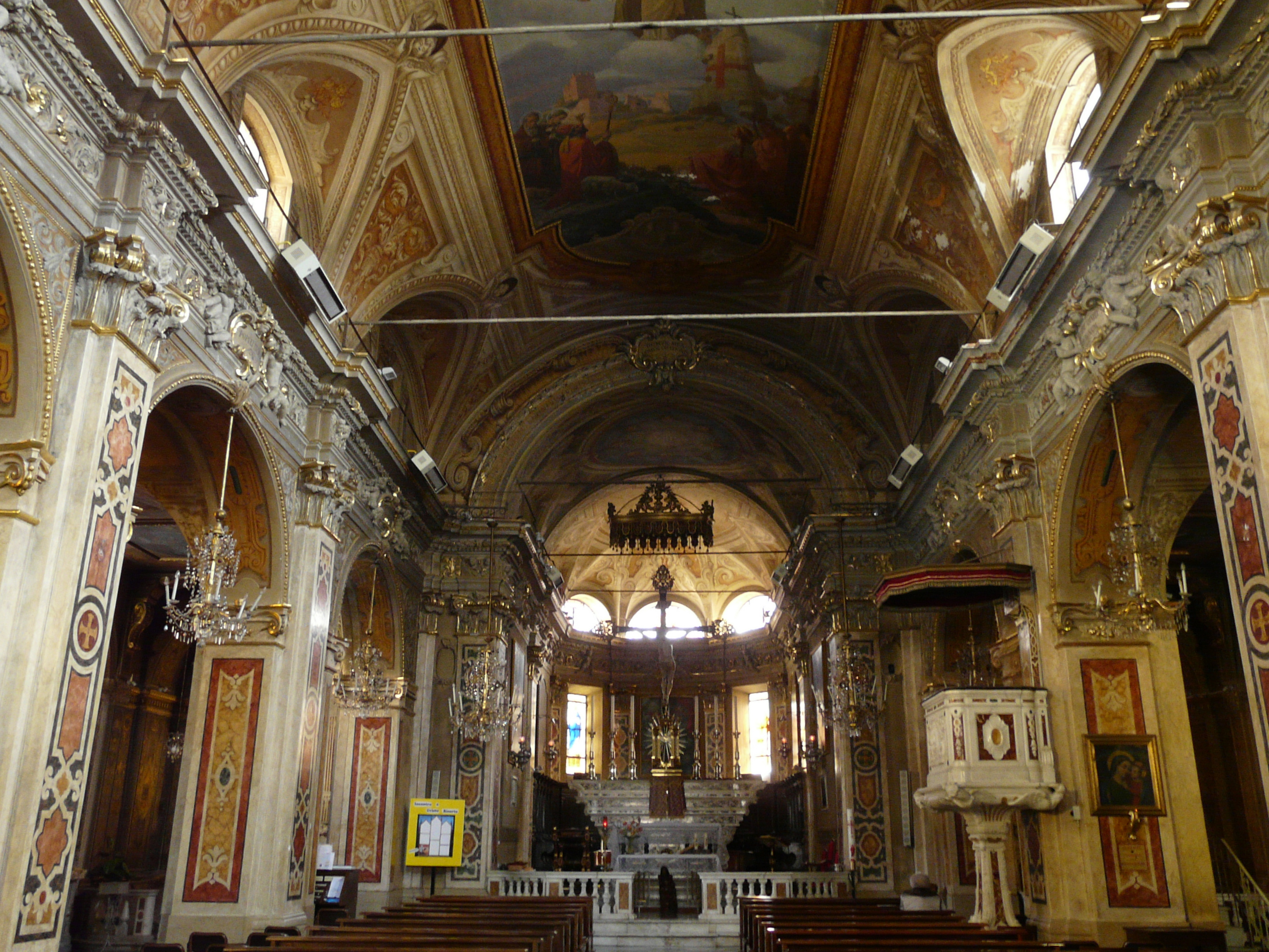 Navata centrale della Chiesa di Sant'Onorato di Arles, Torriglia, Liguria, Italia